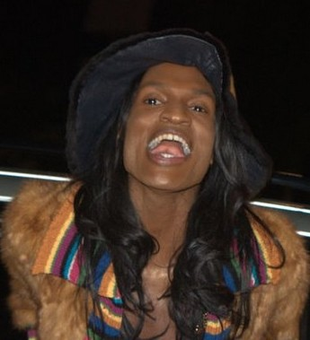 François-Xavier, candidat à la saison 3 de Secret Story, aux NRJ Music awards